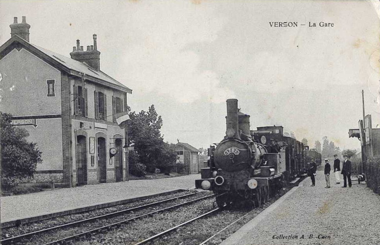 Carte postale ancienne représentant la gare de Verson sur l'ancienne ligne de Caen à Vire (Calvados)